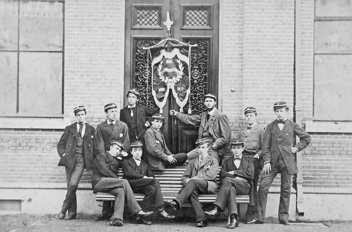 De eerste studenten met vaandel bij het hoofdgebouw van de landbouw hogeschool Wageningen, 1879